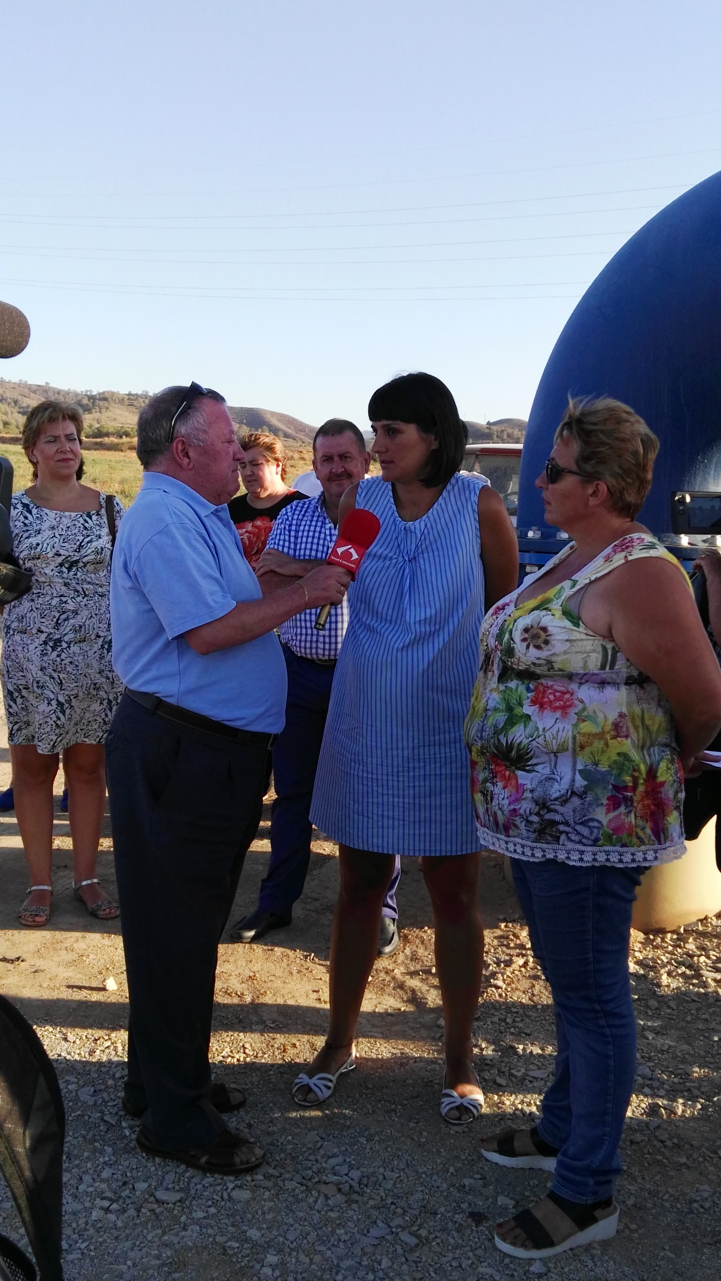 María González Vera Cruz